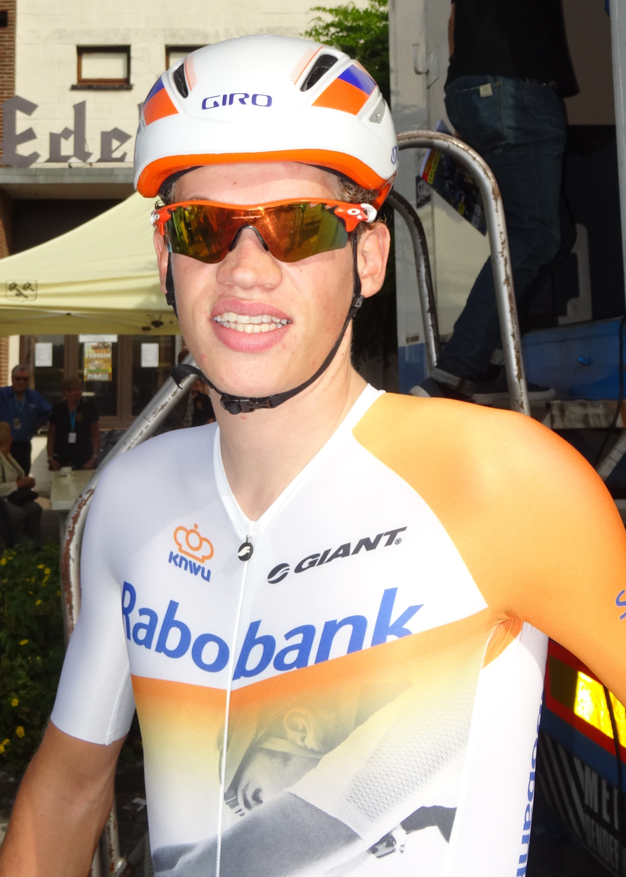 Reportage réalisé le dimanche 28 septembre à l'occasion du départ et de l'arrivée de la Gooikse Pijl 2014 à Gooik, Belgique.